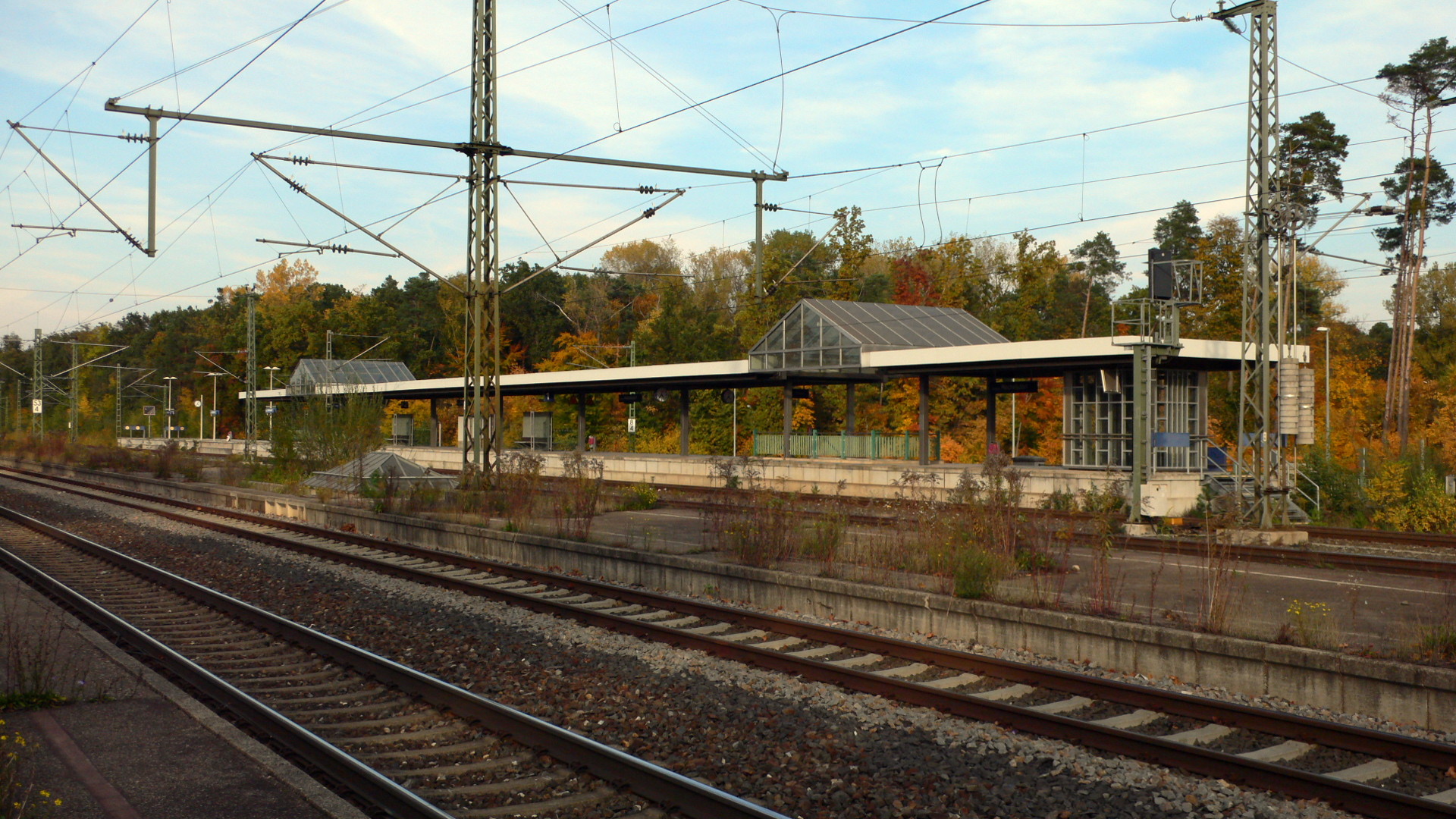 Bahnhof Nürnberg-Reichelsdorf, Blick von Westen auf den S-Bahnsteig; im Vordergrund ist der aufgelassene Bahnsteig an der Bahnstrecke Nürnberg–Augsburg zu erkennen